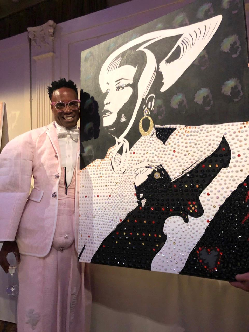 Billy Porter pose à coté de la peinture à son image, dédicacé, réalisée par l'artiste Guillaume Jean Lefebvre.